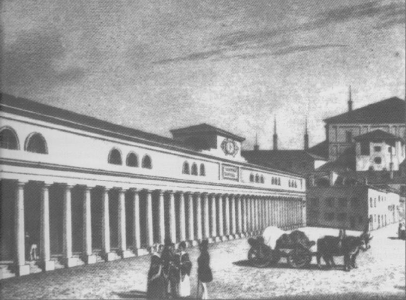 Les beccherie de Parme situées sur la place Ghiaia de Parme détruites en 1928